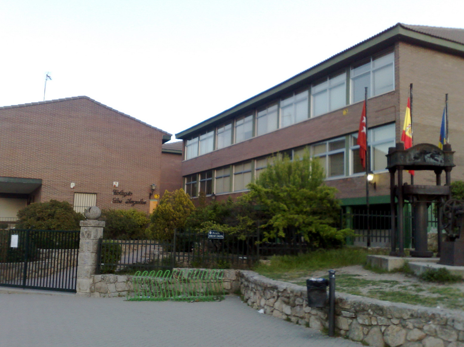 Torrelodones. Polideportivo. Acceso principal